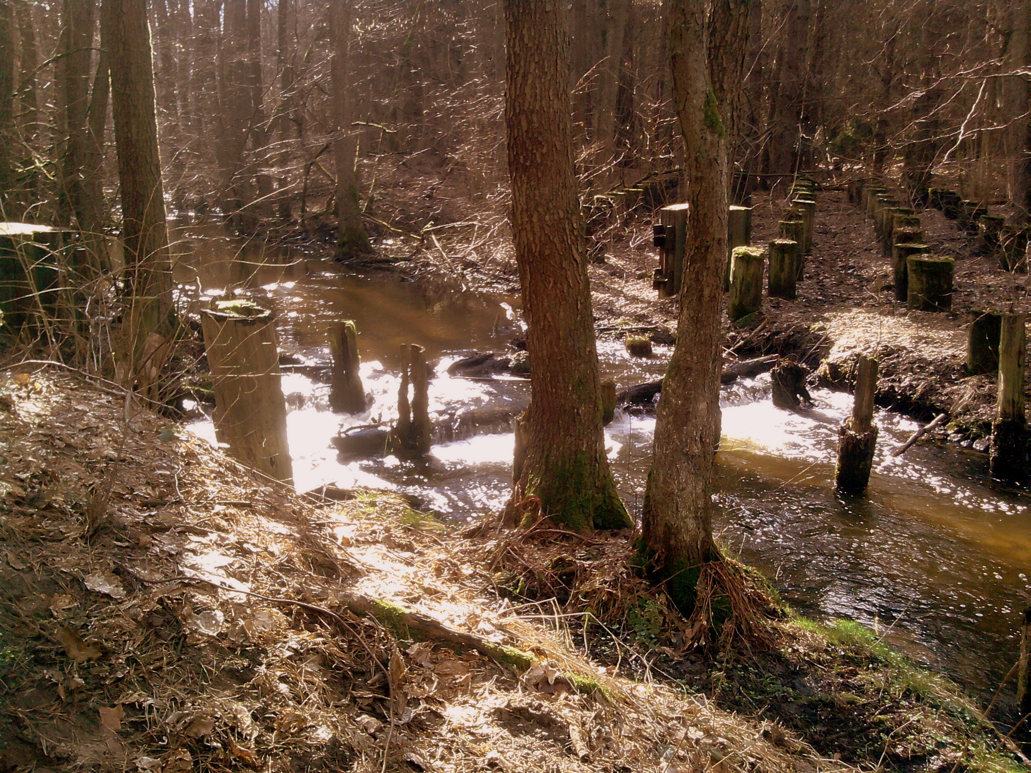 Jeziorna przecinająca zaporę ppanc MRU